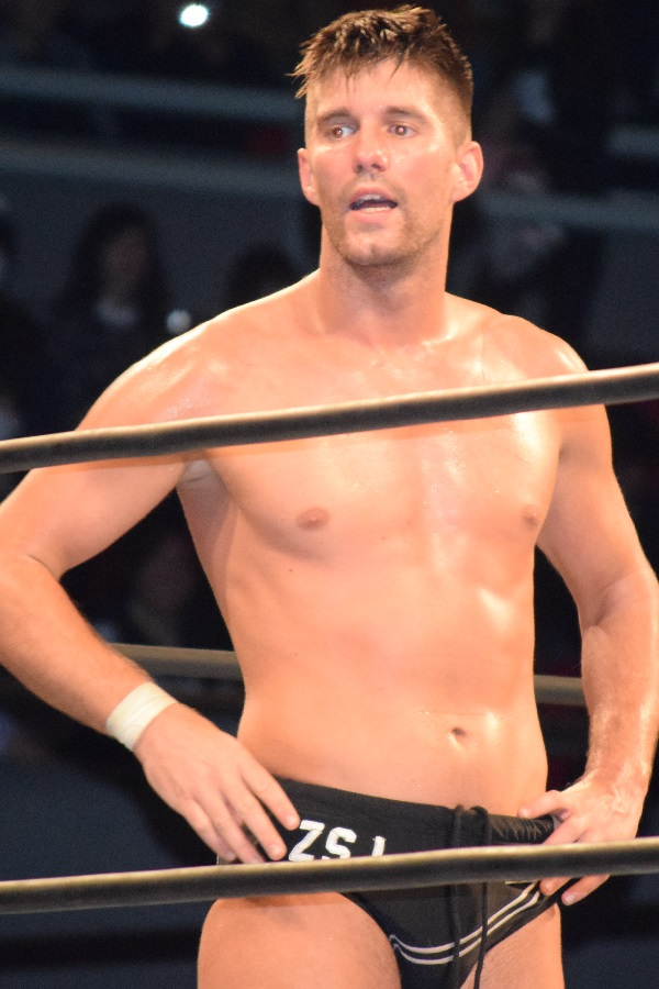 2018年3月11日 ベイコム総合体育館 「NEW JAPAN CUP 2017」 ザック・セイバーJr.